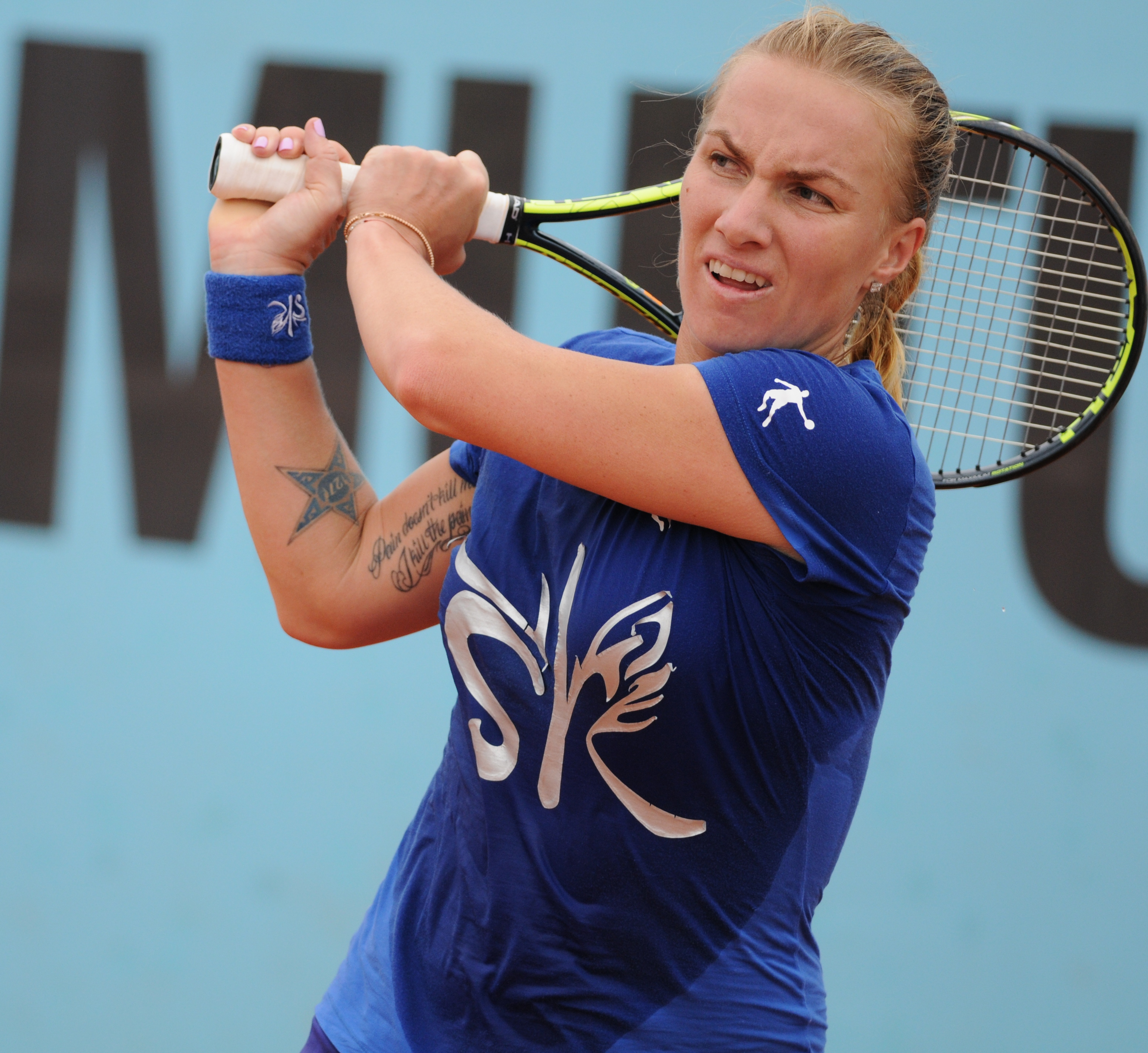 Svetlana Kuznetsova